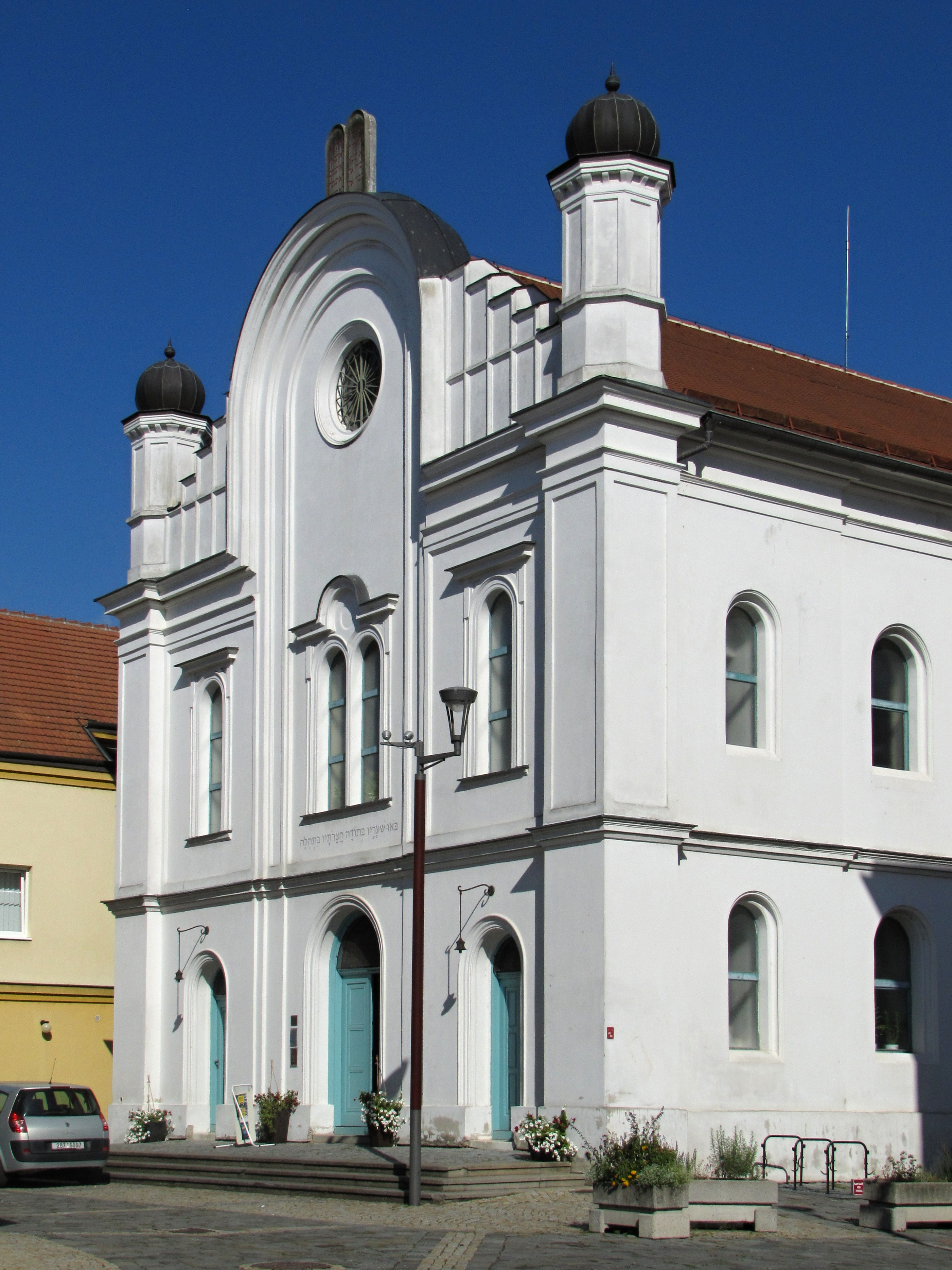 Synagoga v Břeclavi v ulici U Tržiště